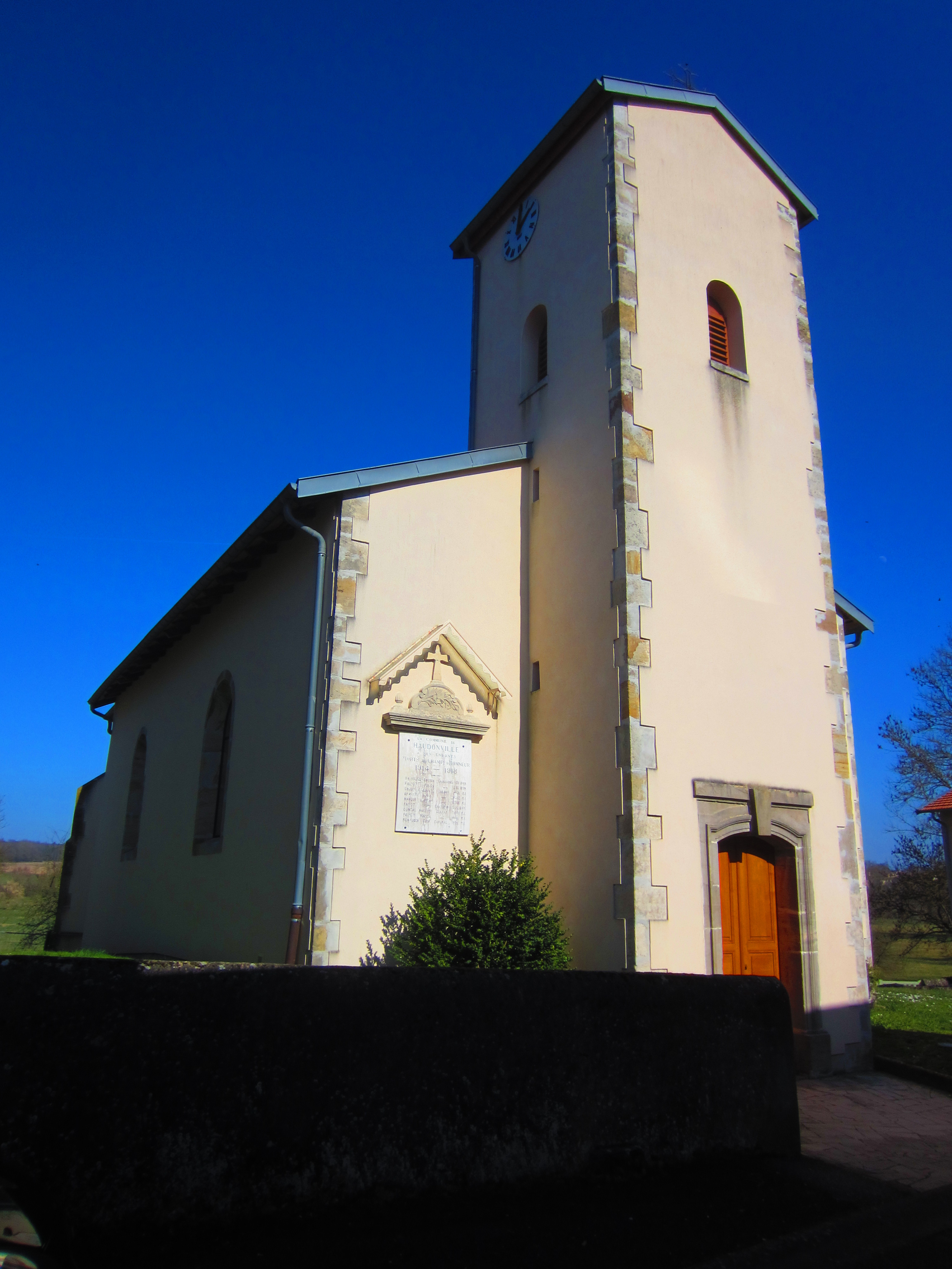 Haudonville eglise